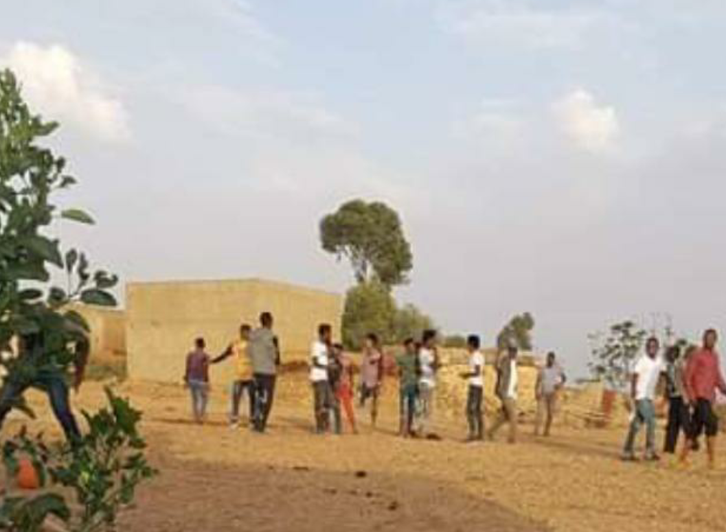 Adi Bakel Bewohner